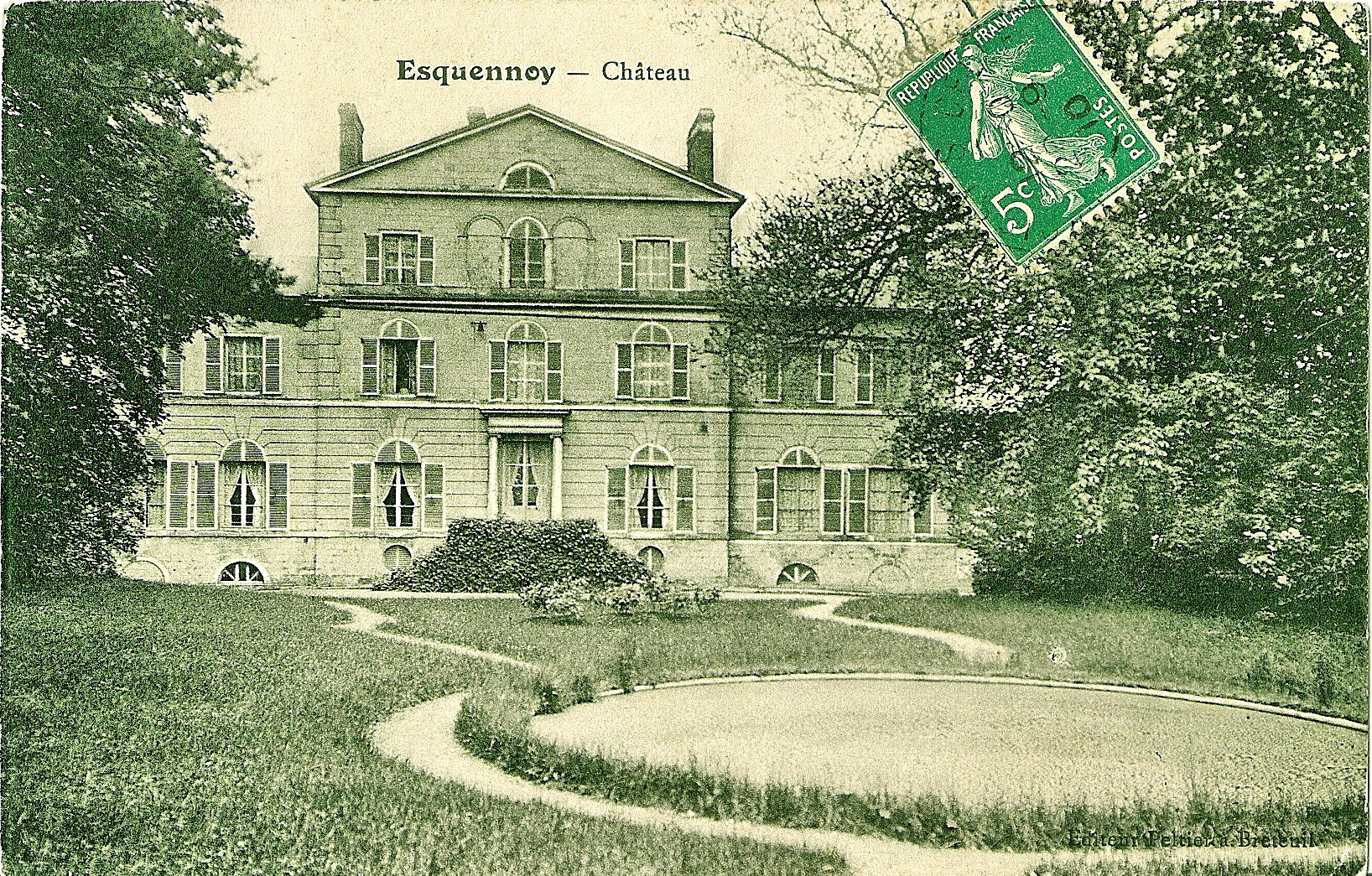 Carte postale ancienne éditée par Peltier à Breteuil Esquennoy |ESQUENNOY - Le Château